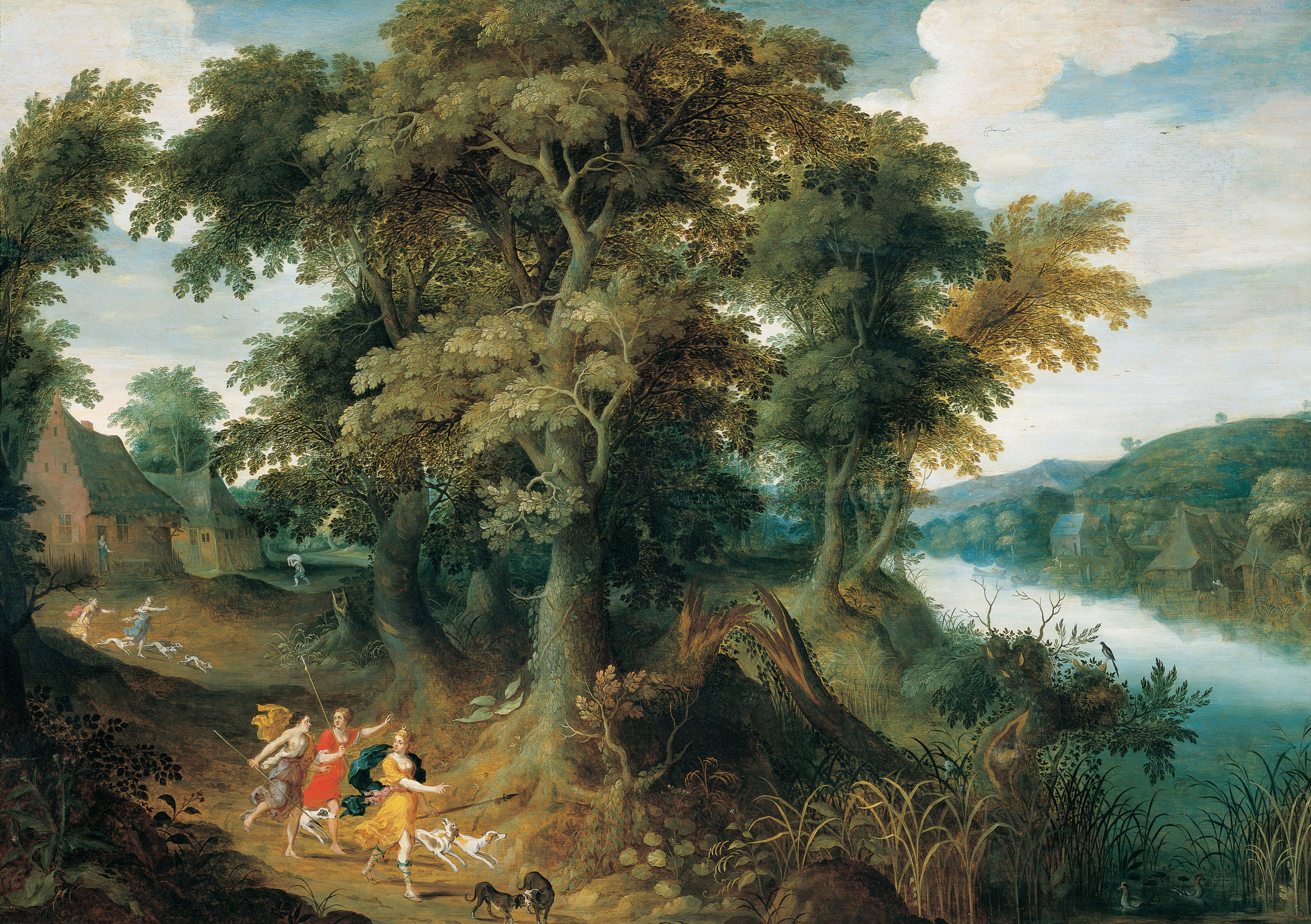 Jasper van der Lanen, Diana y sus Ninfas de caza. Siglo XVII. 83 x 118 cm . - Marco: 132,3 cm x 97,1 cm, óleo sobre tabla. Inv. 8930.